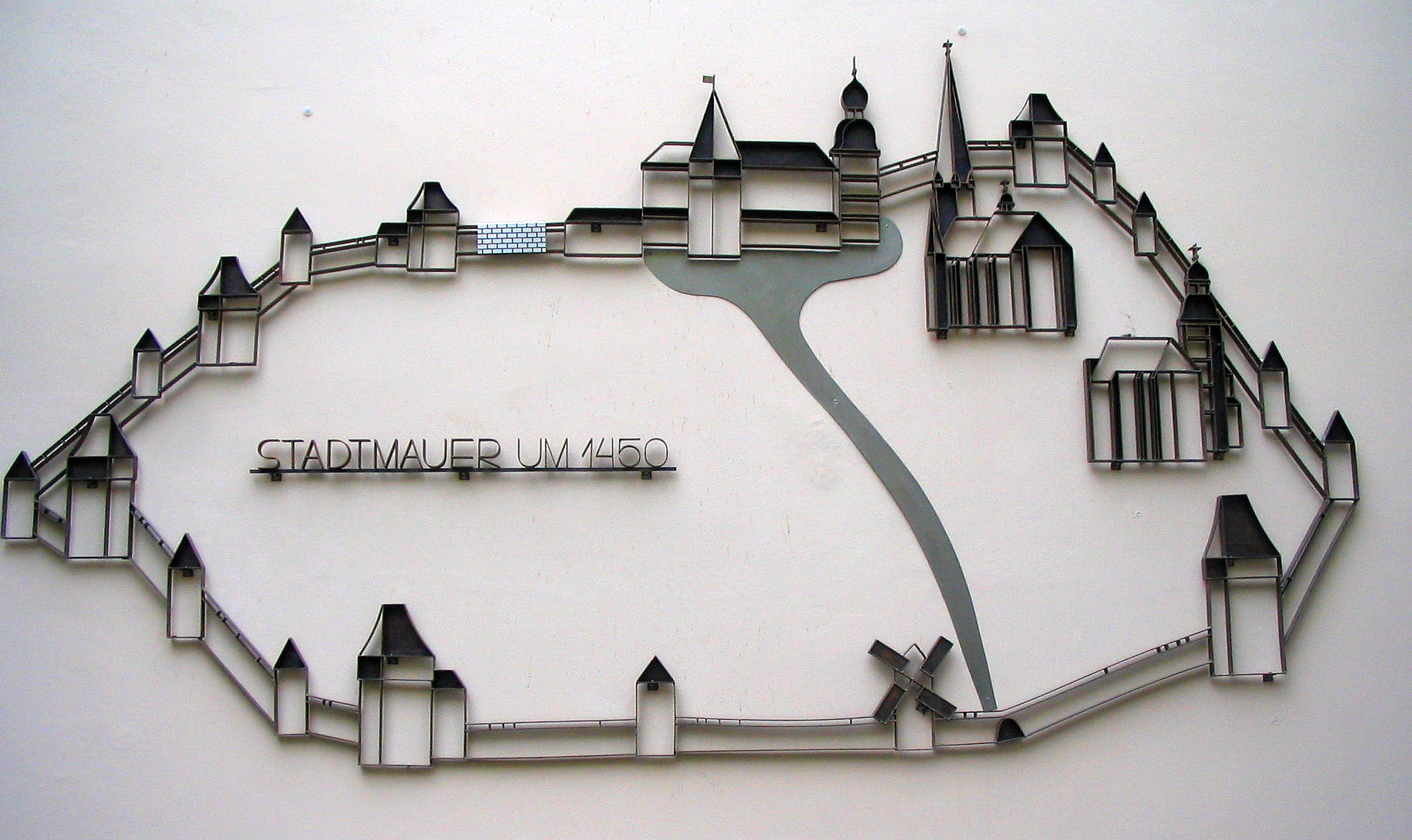 Plastik, Düsseldorfer Stadtmauer um 1450 im Hof des Düsseldorfer Rathauses (hier angebracht etwa 1911/1912). Hinweistafel: Von links nach rechts oben: Portmanns-Turm, Rheintor, Rheinort, Zolltor, Freilegung Stadtmauer, Burggraben (am oberen Ende des Baches Düssel), Schloss um 1500, Alter Zollturm. Von links nach rechts unten: Berger Tor, Flinger Tor (linke untere Ecke), Karrendrievers Turm, Lyrenturm (Windmühle), Ratinger Tor (rechte untere Ecke). Rechts der Düssel Lambertuskirche (oben), Kreuzherrenkirche. Das hier gezeigte Relief befand sich in einem Kellerraum des Gebäudes Rathausufer 8, der heute nicht mehr öffentlich zugänglich ist. Aus Messing, das mit Kupfer unterlegt ist, hat der Künstler Ferdi Walther den Verlauf der Stadtmauer mit den Toren und Türmen von der Landseite aus nach der Rekonstruktion in dem Buch "Düsseldorf Stadt und Festung" gestaltet. Die Fototafeln zeigen die ältesten zeichnerischen Darstellungen der mittelalterlichen Stadtmauer und der späteren Festung, die 1801 geschleift wurde. Die Metallarbeit zeigt den nach der Stadterweiterung von 1384 errichteten Mauerring. Der Mauerabschnitt zwischen Schloss und Kreuzherrenkirche ist bereits nach der Stadterhebung 1288 angelegt worden. Die hier sichtbare, 1982 bei der Rathauserweiterung wiederentdeckte Stadtmauer muss Anfang des 15. Jh. beim Ausbau des Rheinwerfts fertiggestellt worden sein. Schenkung Dr.-Ing. Edmund Spohr Architekt